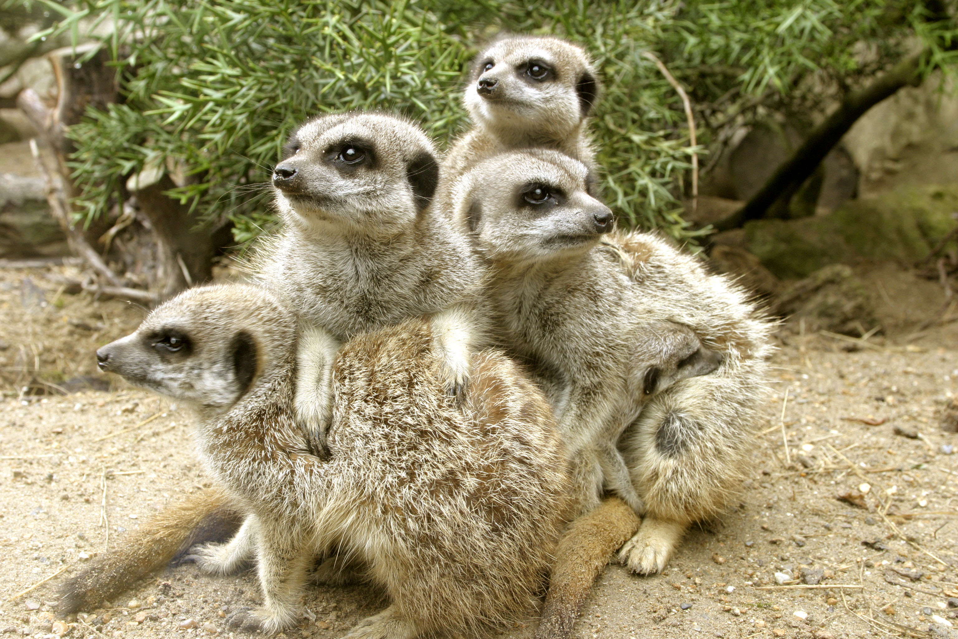 Meerkat_Group_at_Drusillas_Park.JPG